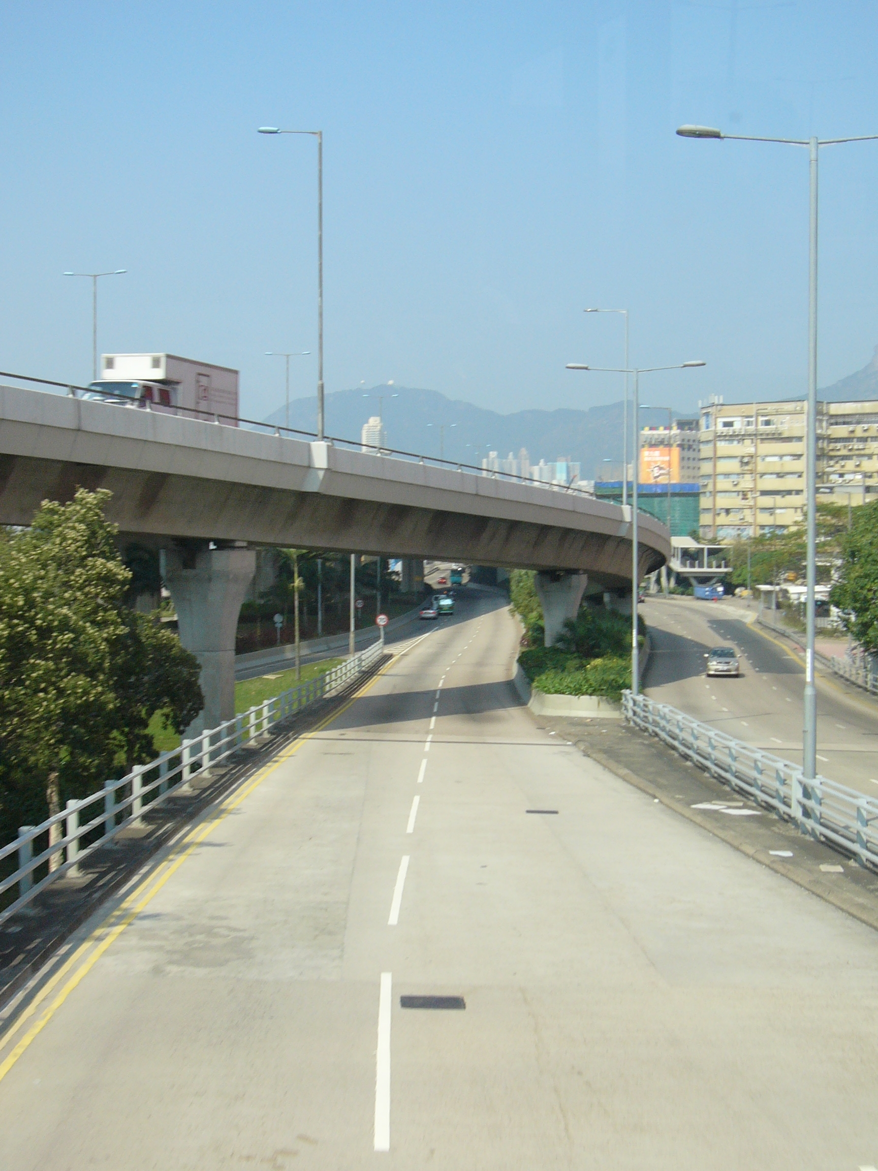 Kwun Tong Bypass